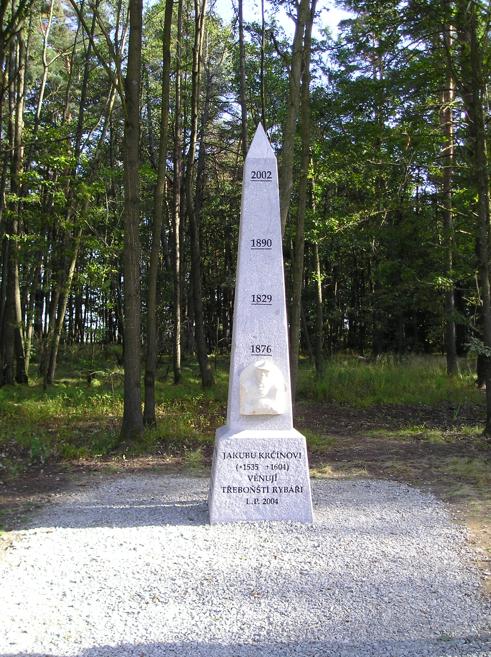 Památník povodní. Třeboň-Stará Hlína, u hájovny Smitka poblíž rybníku Rožmberk.